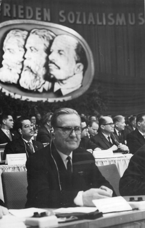 Zentralbild Kollektiv Sta-Qu 15.1.1963 VI. Parteitag der SED vom 15.-21.1.1963 in der Werner-Seelenbinder-Halle in Berlin (1.Tag) UBz: Im Präsidium: Ville Pessi, Generalsekretär der Kommunistischen Partei Finnlands (Heilig)